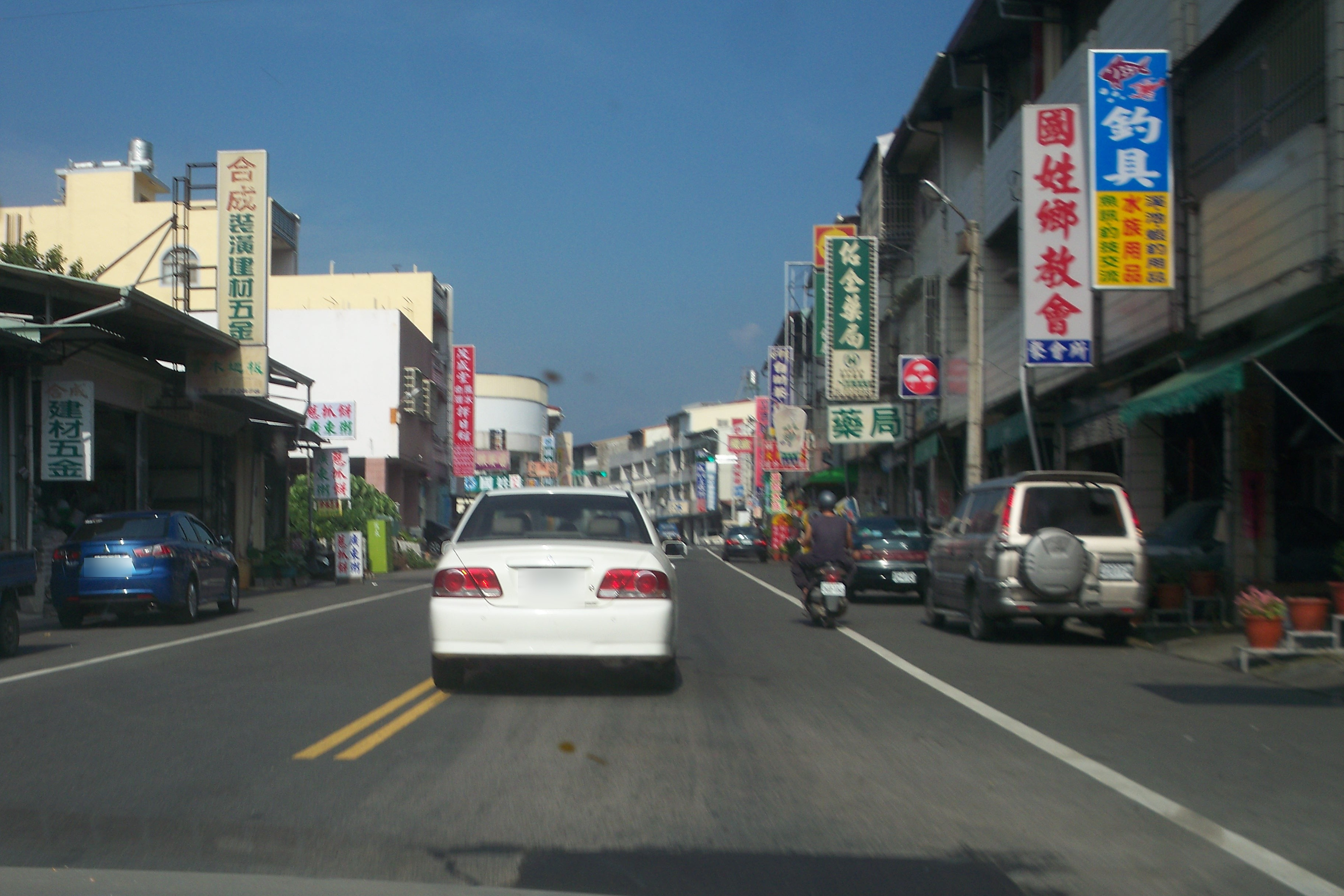 南投縣國姓鄉 市區